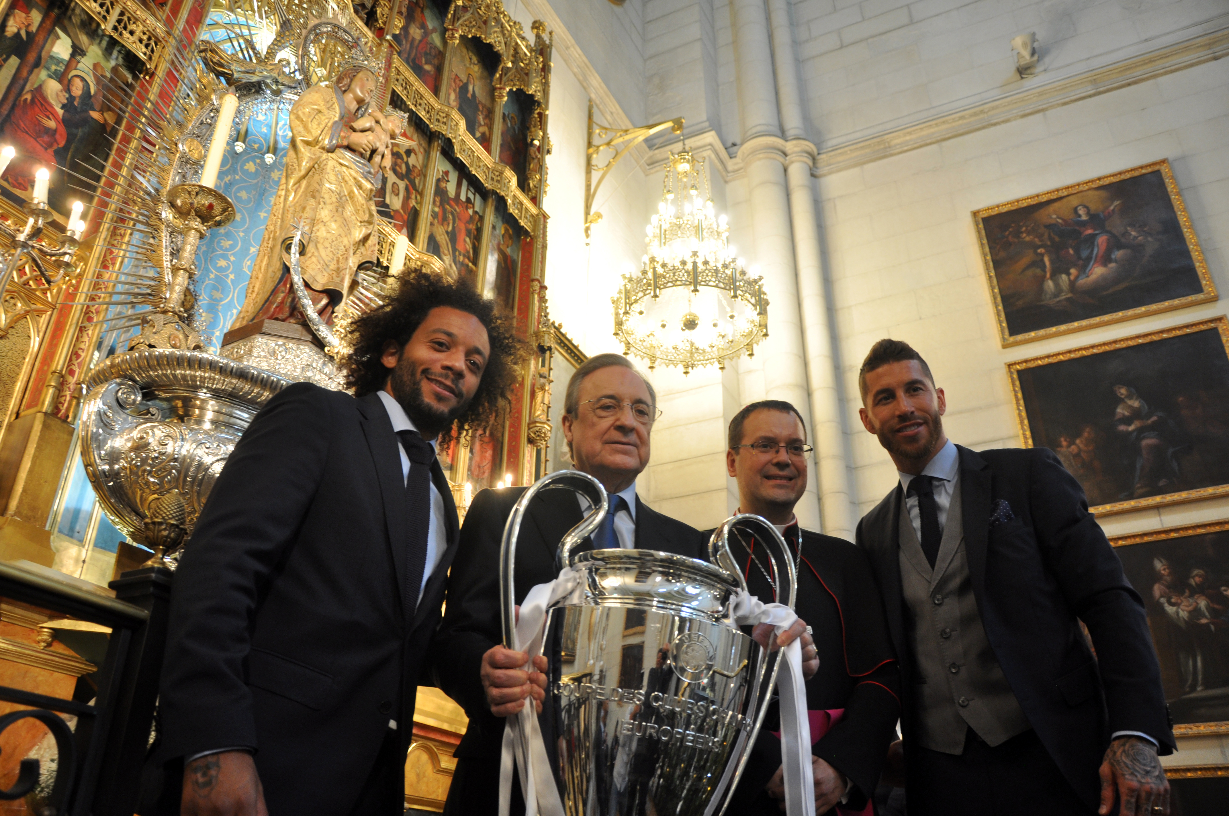 El Real Madrid ofrece la Champions a la Virgen de la Almudena. Créditos: archimadrid / José Luis Bonaño.